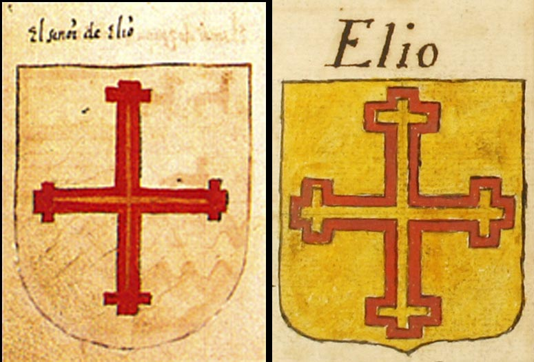 Escudo de Armas del Señor de Elío "Inventario de Papeles y Escrituras de la Casa de Ayanz y sus Mayorazgos de Santamaría y Val de Erro. arreglados el Año de 1775. tomo 2"